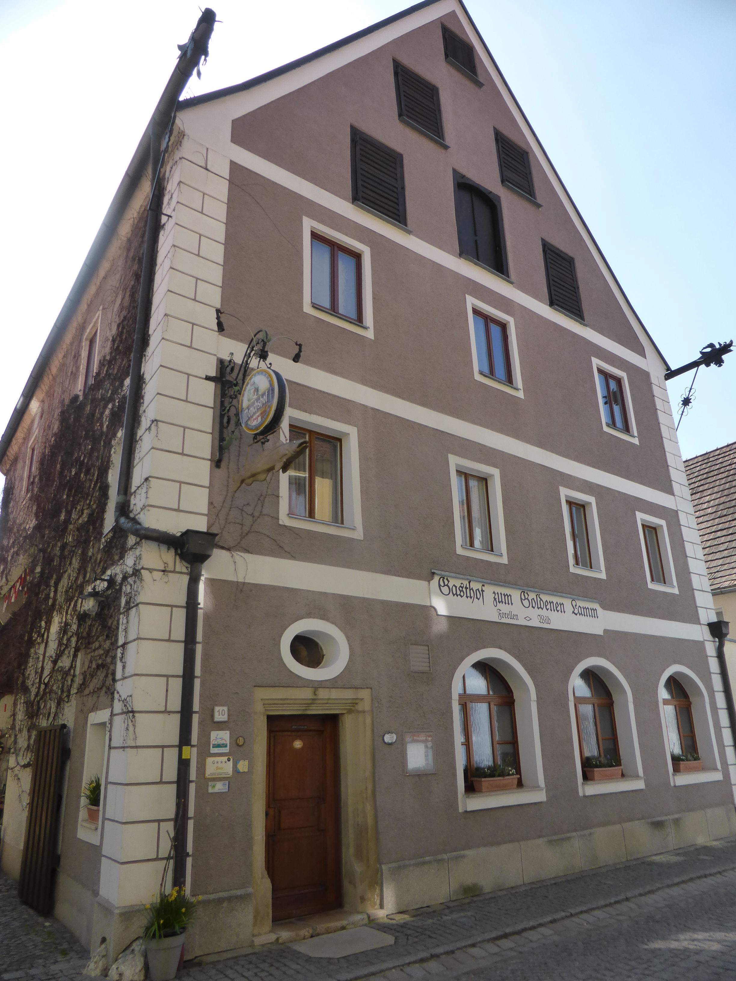 Hauptstraße 10 (Schmidmühlen)